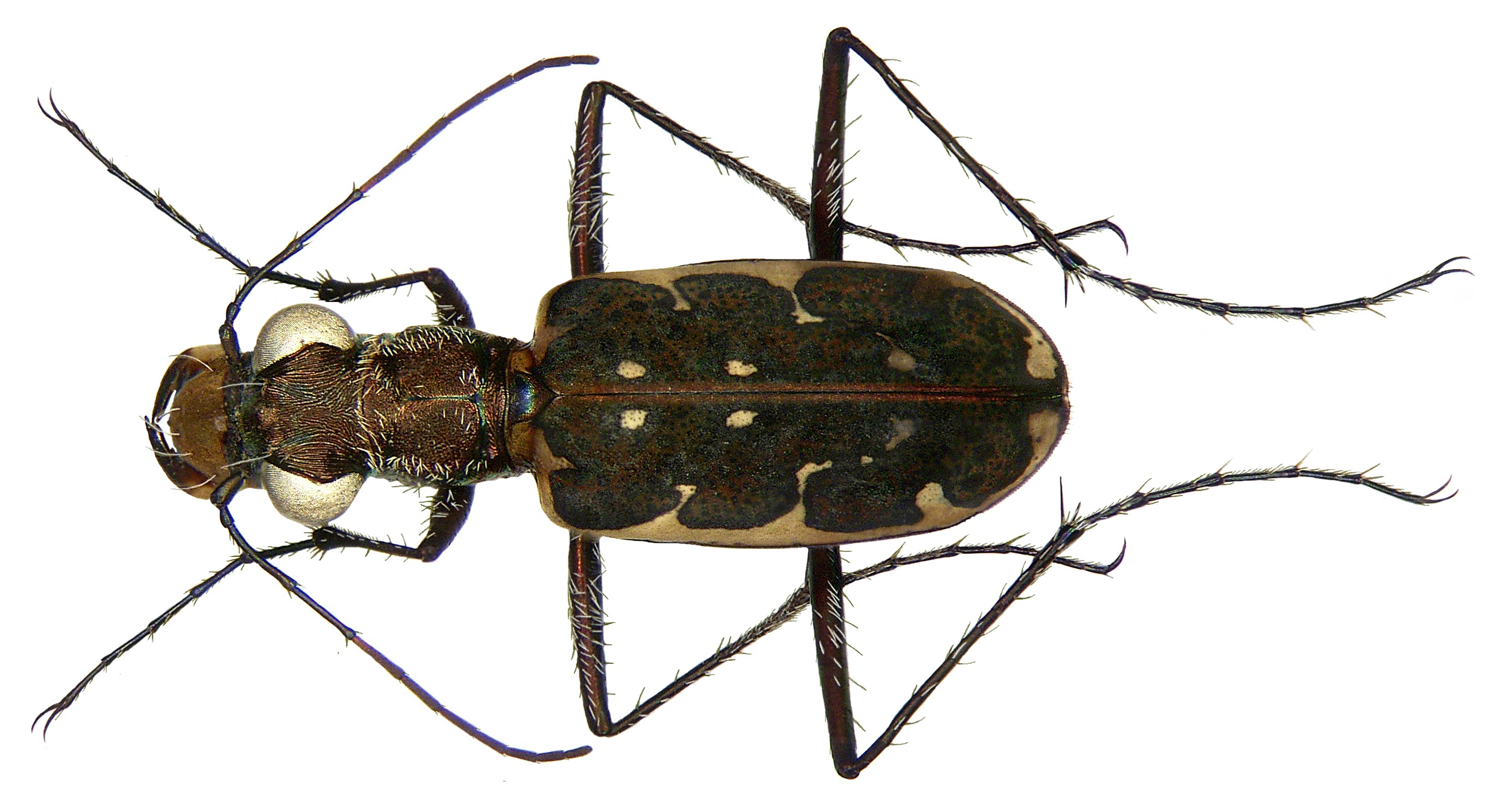 Familie: Carabidae Größe: 11 mm Fundort: Thailand, Khao Lak leg. A.Skale, 2007; det. J.Gebert, 2008 Foto: U.Schmidt, 2008